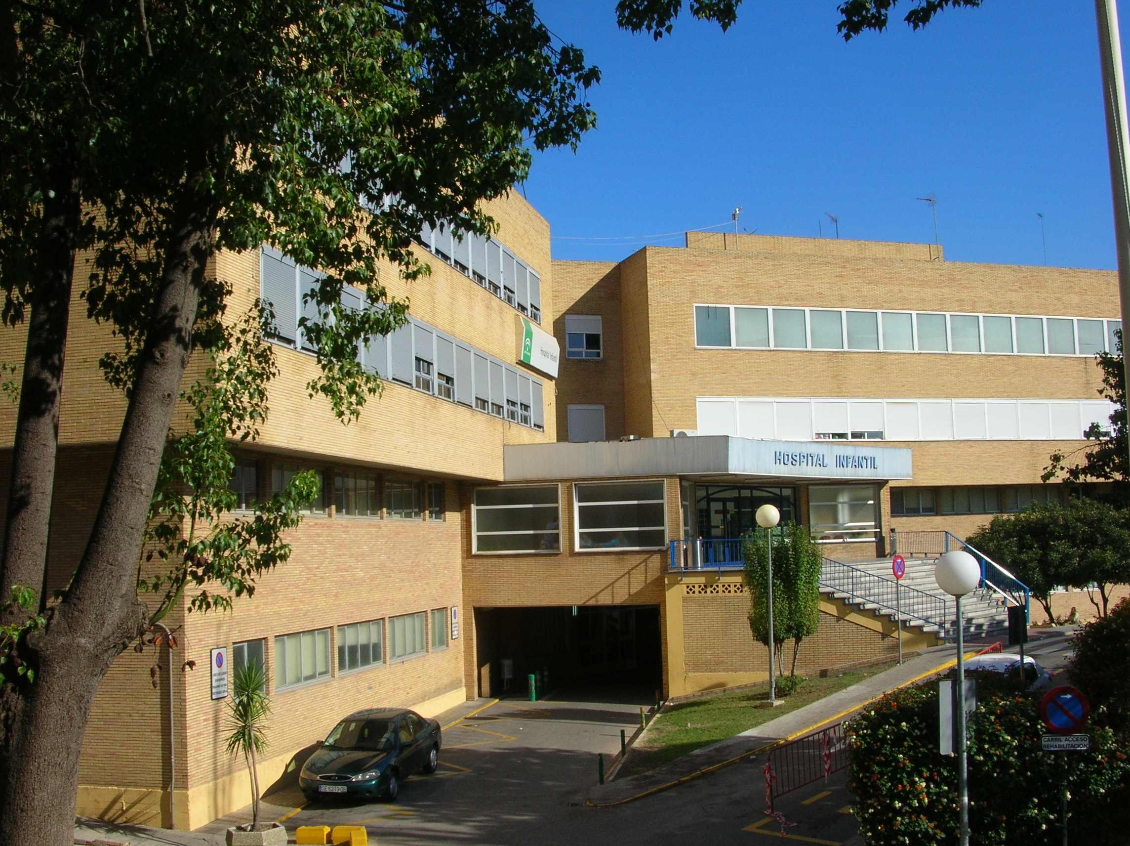 Hospital infantil de los Hospitales Virgen del Rocío, Sevilla